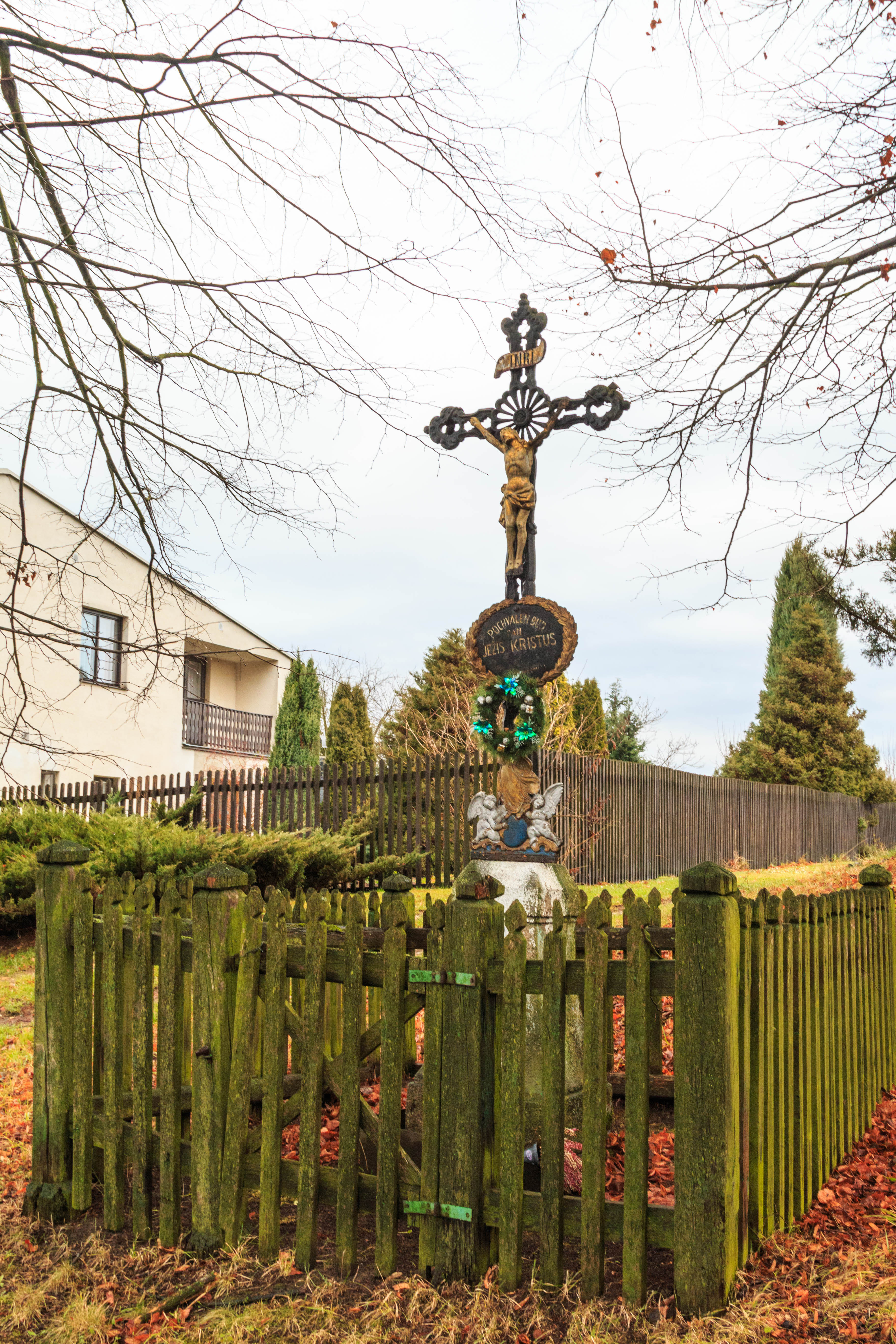 Kobylí Hlava křížek